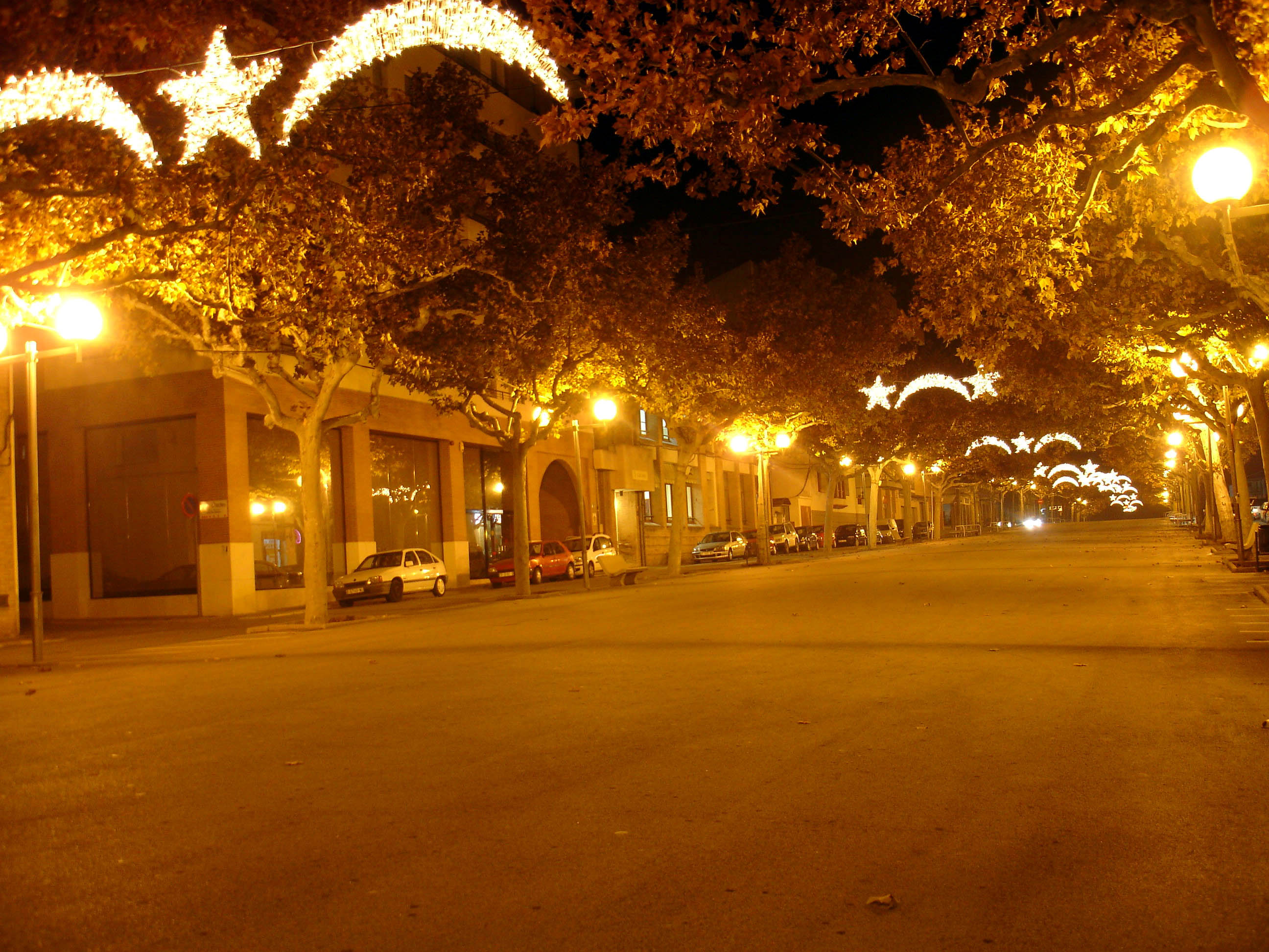 Vista del tram nord del Passeig (al davant es pot veure la Biblioteca Josep Mas Carreras)